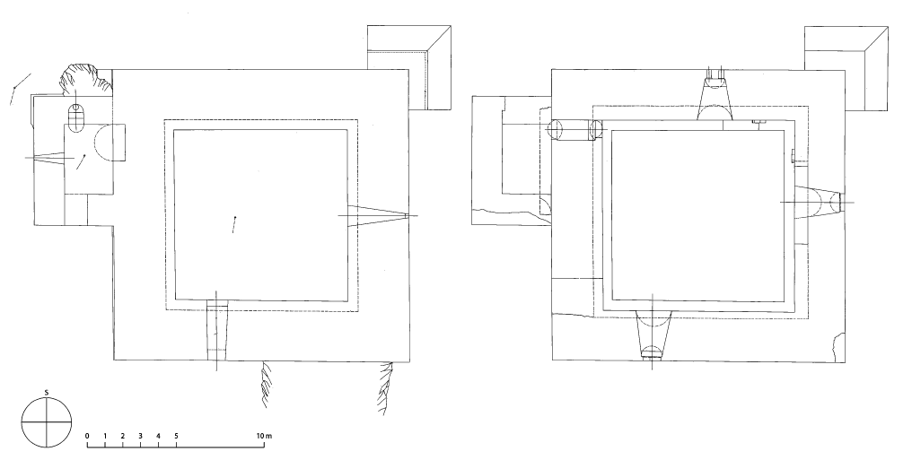 Burg Přimda, Westböhmen, Tschechische Republik. Grundriß des Erdgeschosses und des ersten Geschosses des Wohnturms. Veröffentlicht von Vladislav Razím in: Průzkumy památek 2008, S. 43 Abb. 10, auf Grundlage der Vermessung durch J. Houžvic 1962, aufbewahrt im Archiv der Národní památkový ústav (NPÚ).